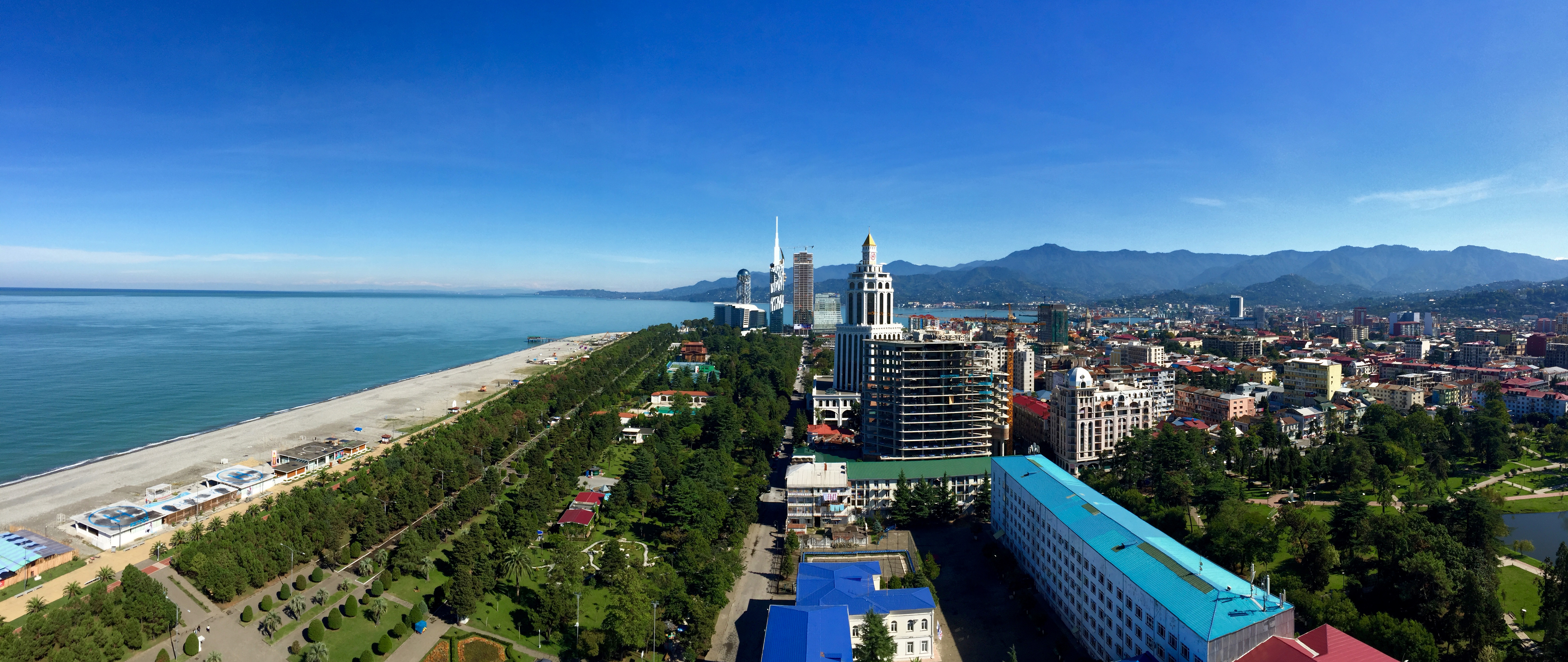 Batumi 180